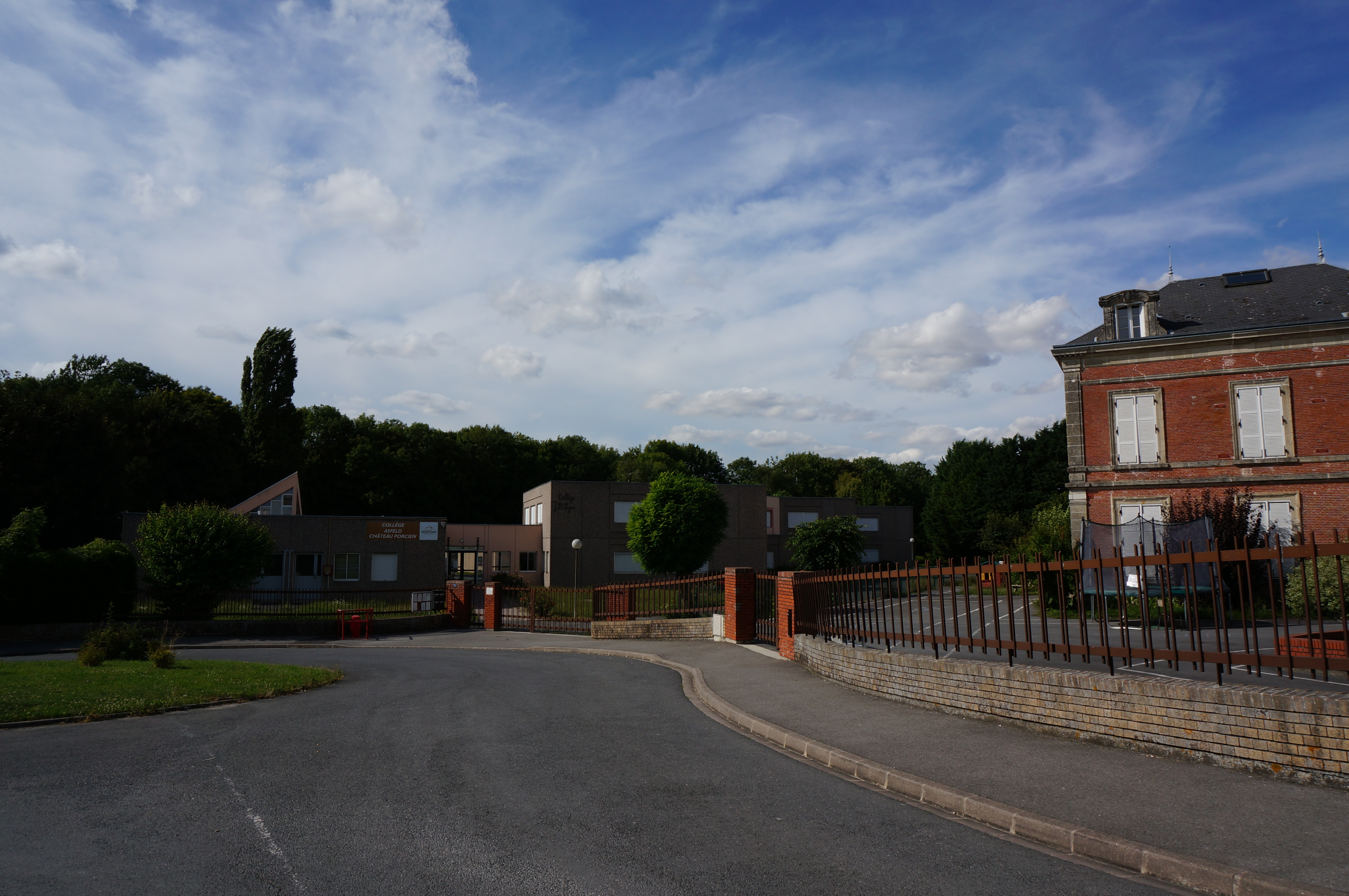 A Asfeld .